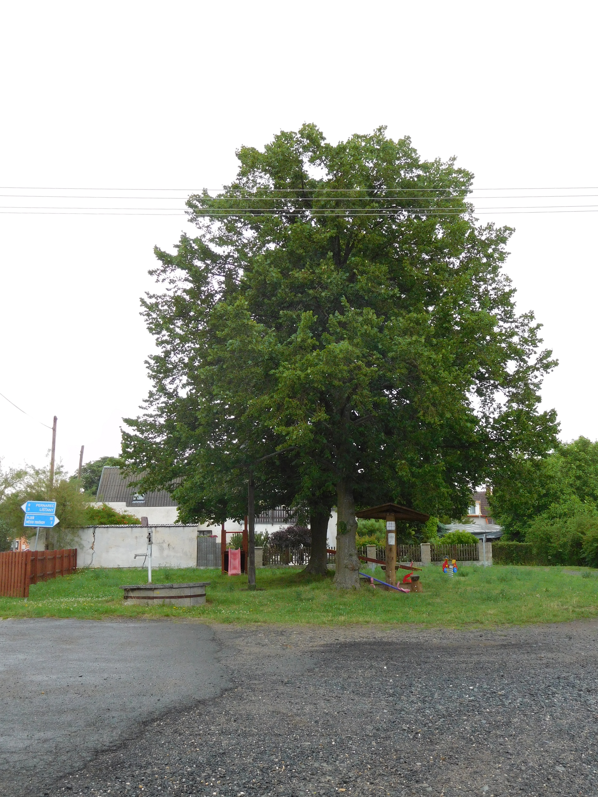 Písek - náves s lípami, zvoničkou a minihřištěm